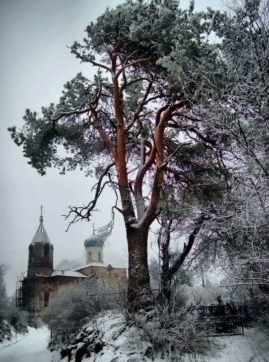 4 ноября приходом храма св. Иова Многострадального был установлен поклонный крест на месте заключения Столбовского мира в 1617 г. 2 декабря был установлен ещё один крест (у входа в Введенский монастырь), посвященный памяти Тихвинских новомучеников. Всего в этом году были установлены 7 поклонных крестов а также 2 креста над куполом и колокольней храма.